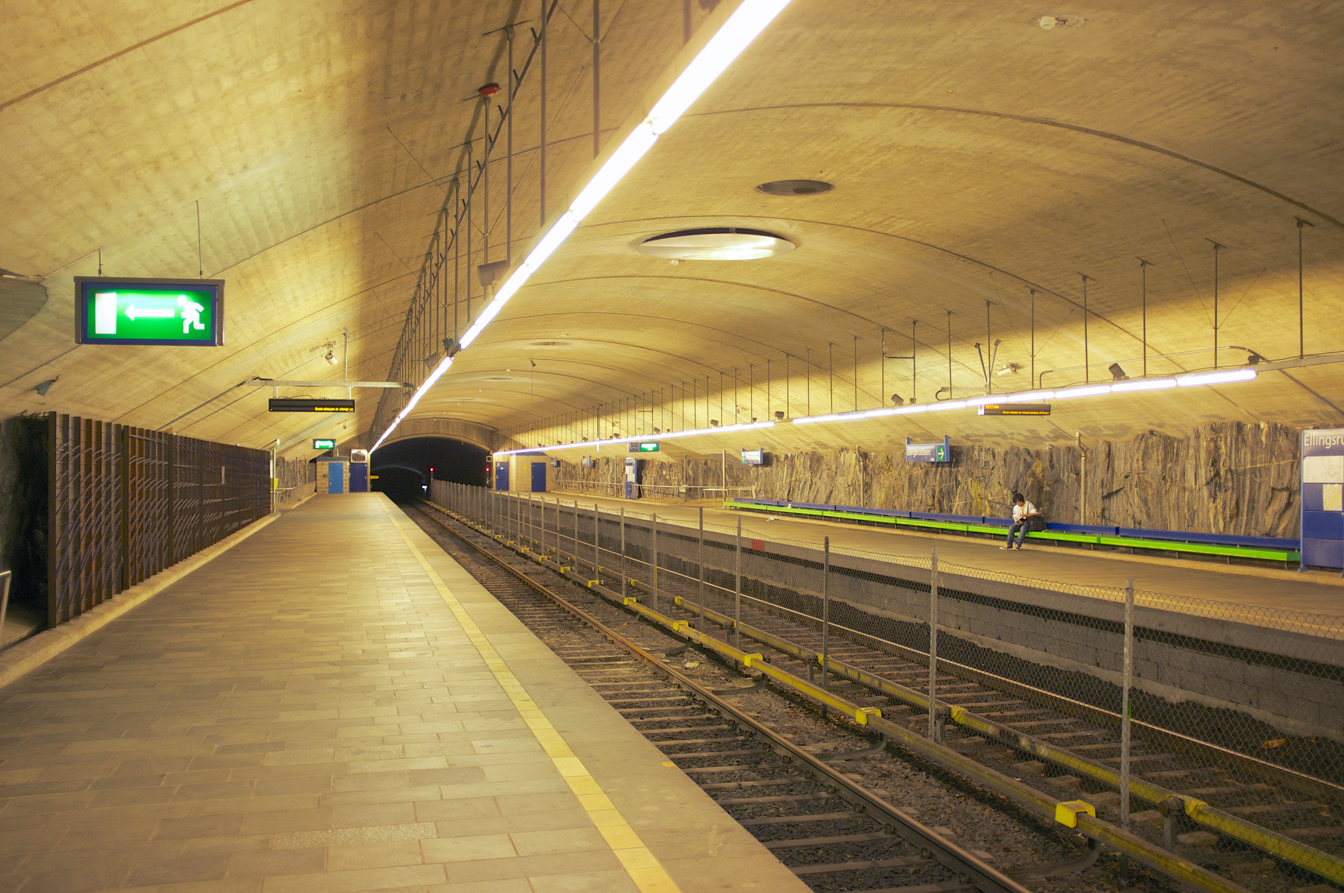 Ellingsrudåsen stasjon på Furusetbanen i Oslo.